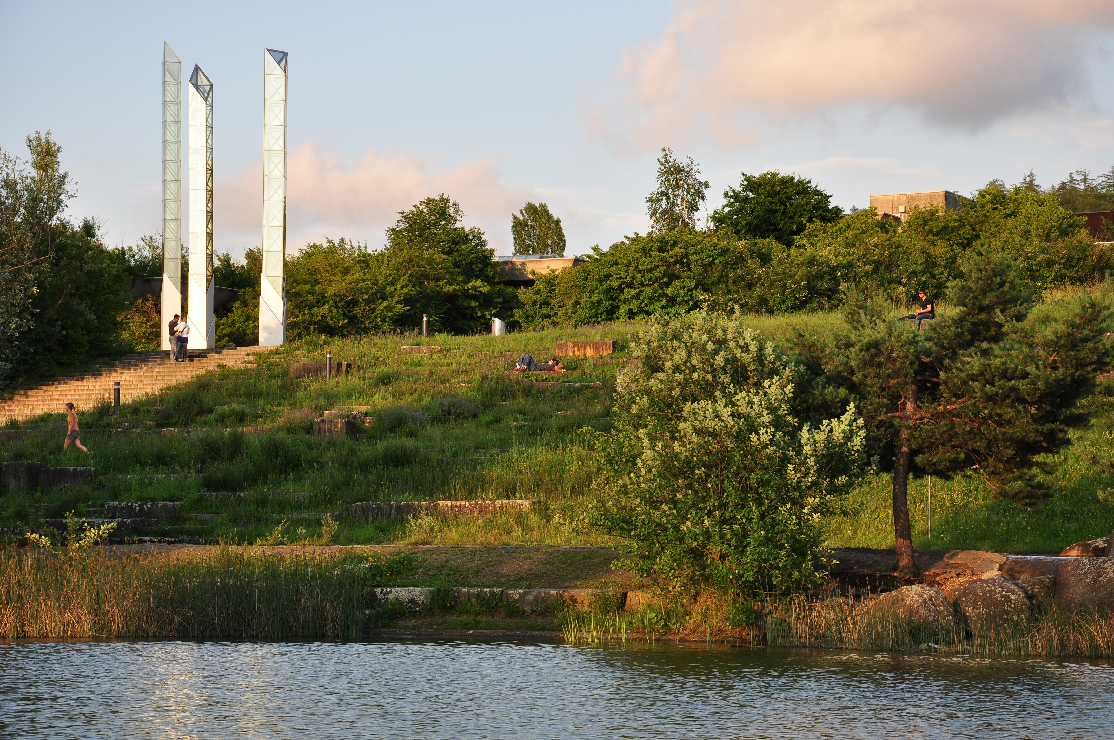 Irchelpark in Zürich (Switzerland)